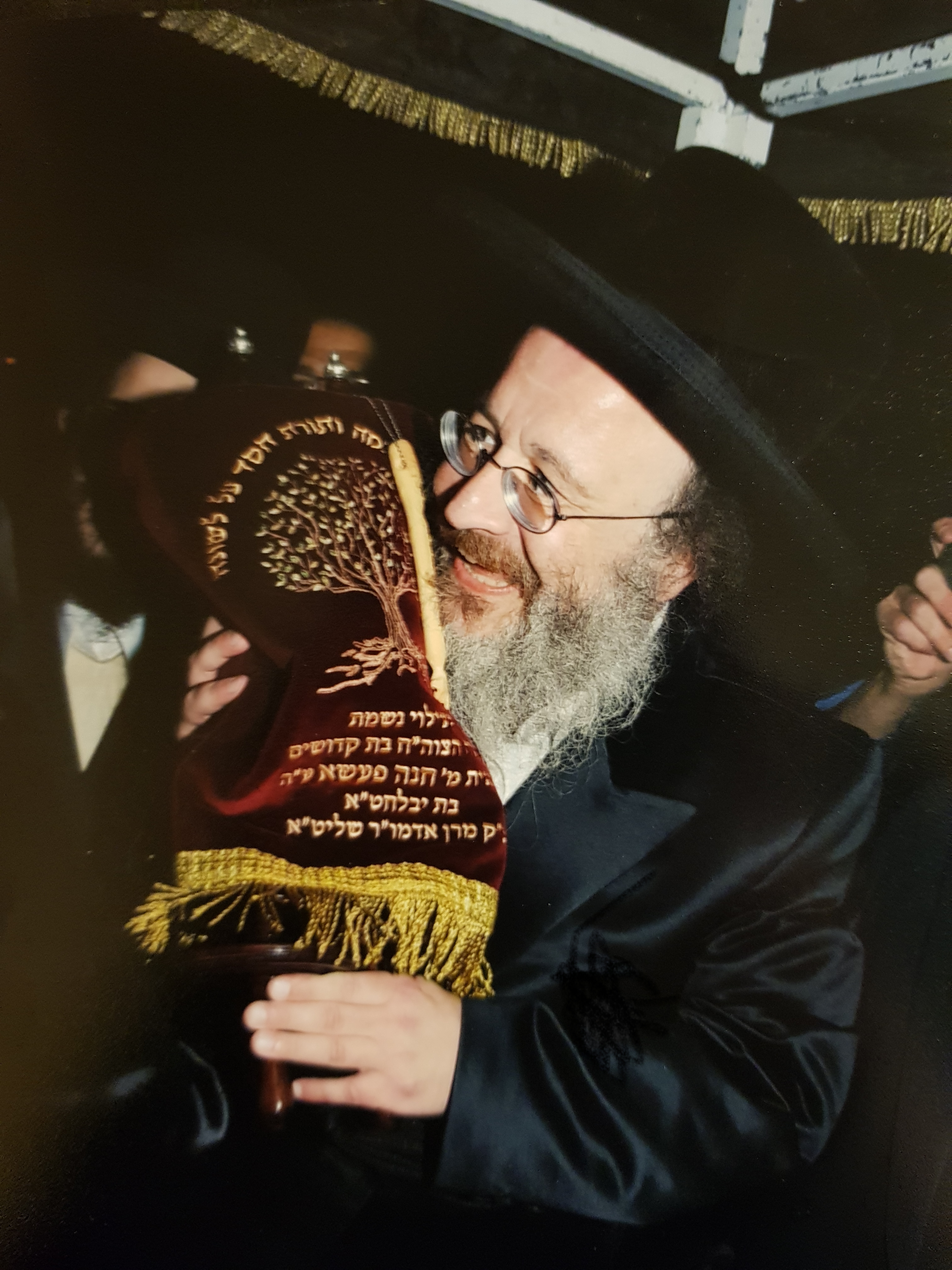 Ostrove Biala rebbe